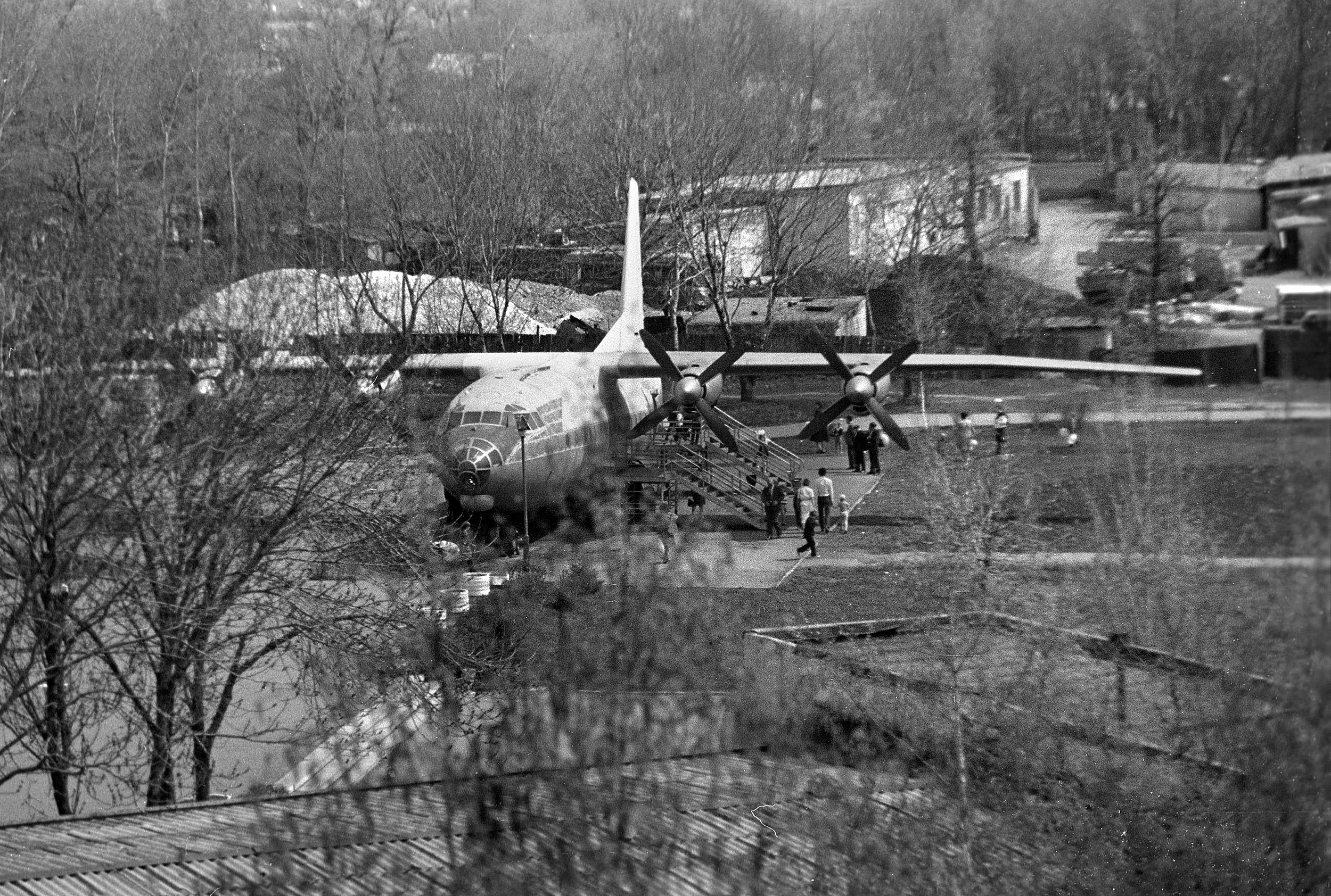 Ретрофото, 1982 г. Комсомольский парк (Быханов)